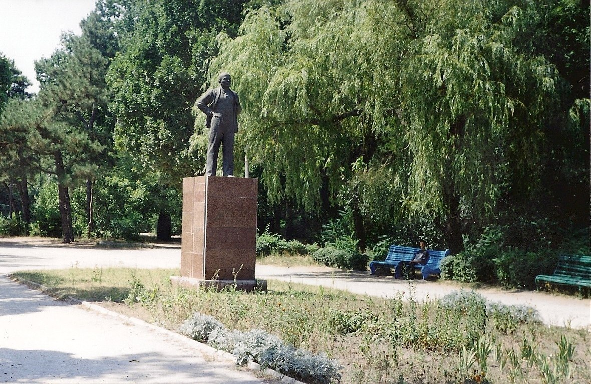 Мелитополь, Украина